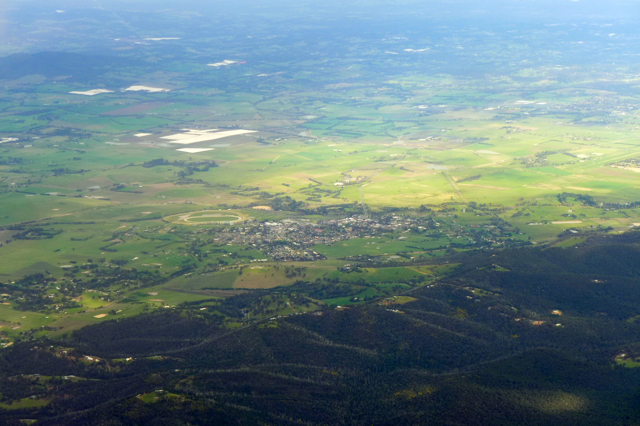 Yarra Glen, VIC